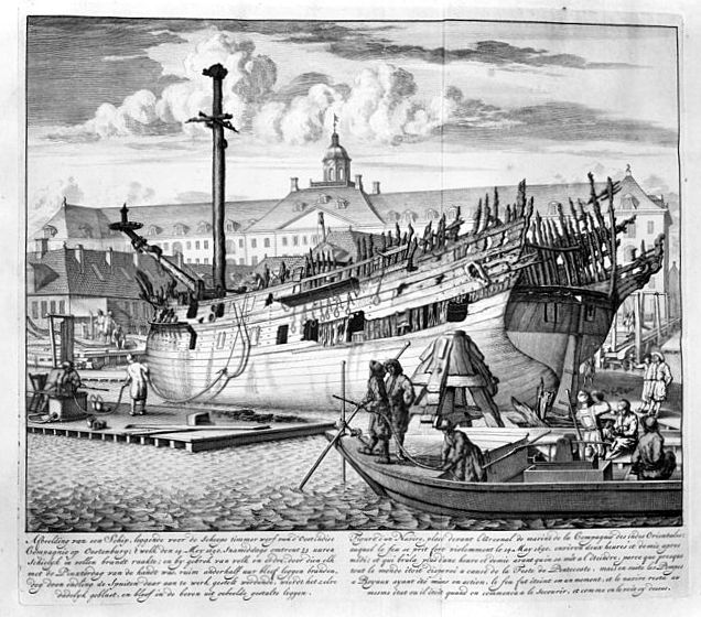 Scheepswerf/ Verenigde Oost-Indische Compagnie: Tekening van het scheepswerfterrein op Oostenburg (opmerking: Reproductie van tekening uit boek)